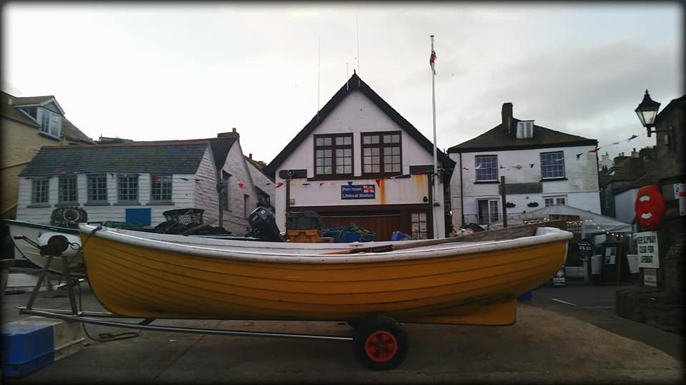 ( port isaac) שעת בוקר מוקדמת בכפר הדייגים פורט איזק